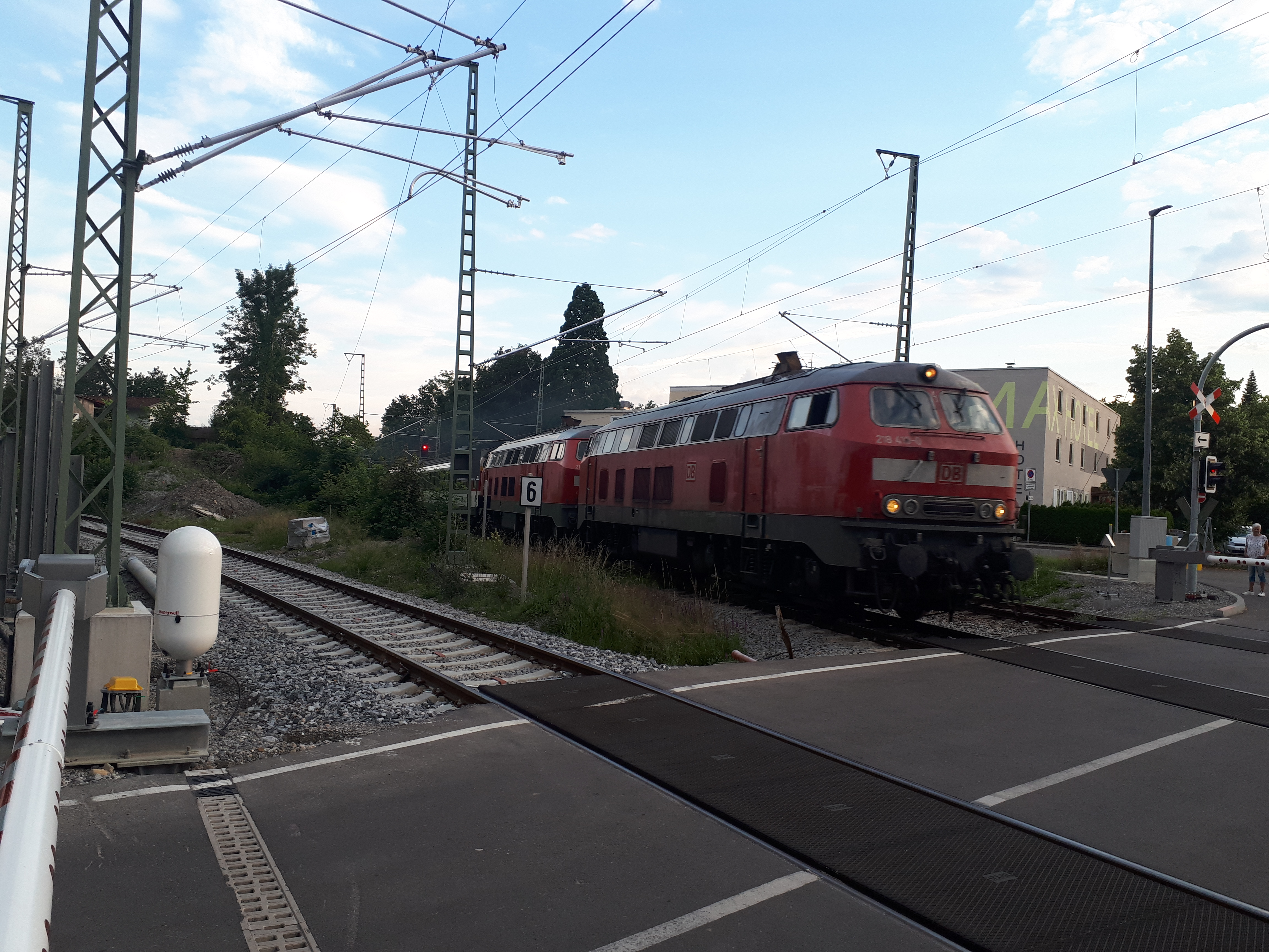 Die elektrifizierte Aeschacher Kurve (eingleisige Strecke nach links) nach dem Umbau im Jahre 2020. Hier die nördliche Einmündung.